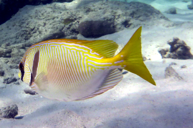 Siganus doliatus en la Gran Barrera de Arrecifes, al noreste de Cairns, Australia